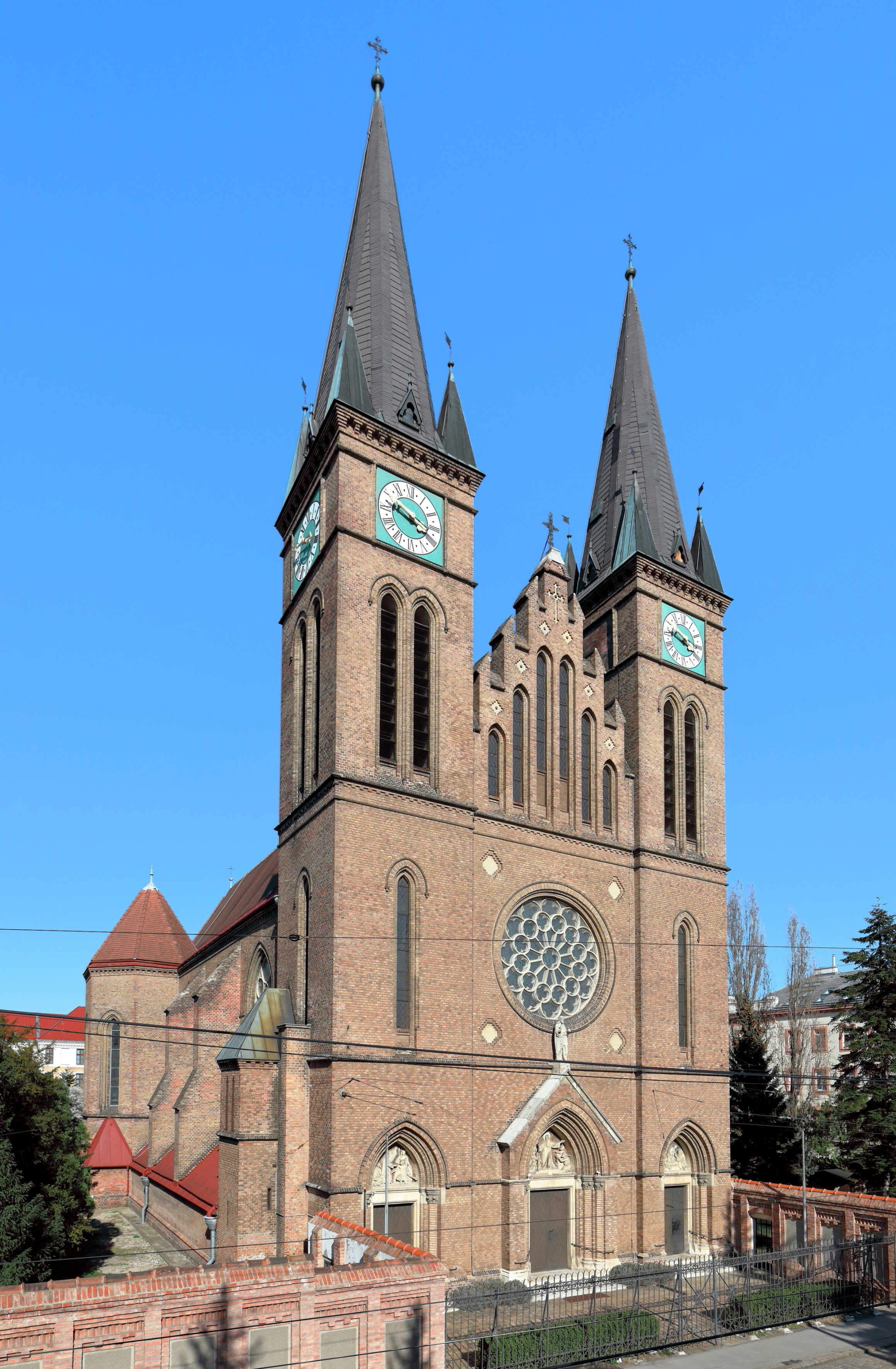 Westansicht der Severinkirche bzw. Lazaristenkirche im 18. Wiener Bezirk Währing.Die dreischiffige, neugotische Hallenkirche wurde von den Lazaristen nach Plänen von Friedrich von Schmidt ab 1876 erbaut und 1878 dem heiligen Severin geweiht.